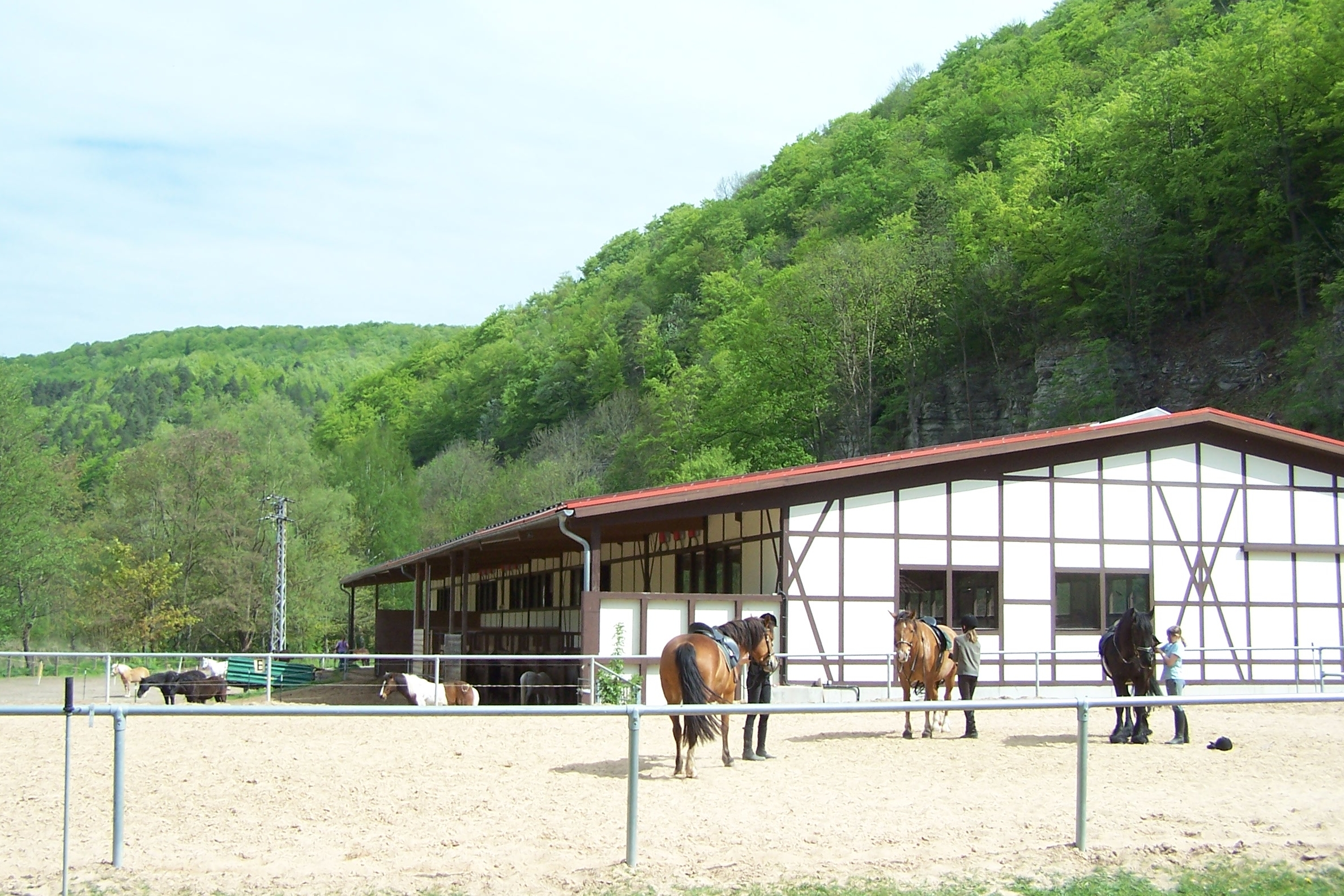 Teilansicht des Reiterhofes.